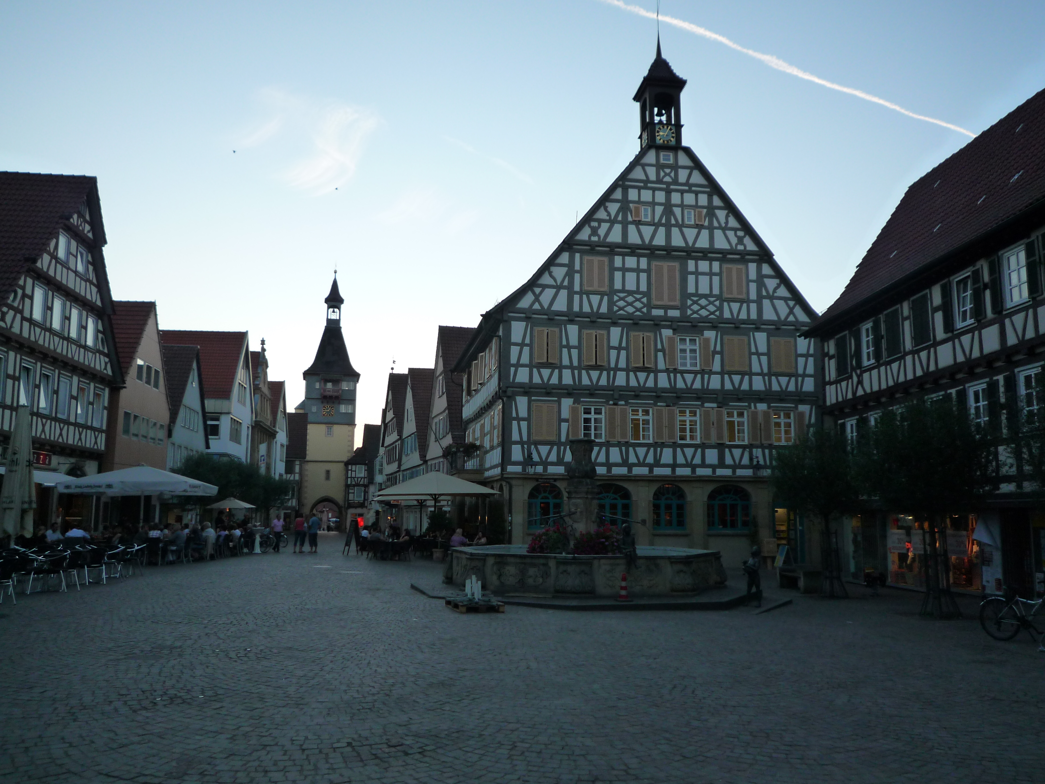 Marktplatz-Marktbrunnen-Schwaikheimer Torturm